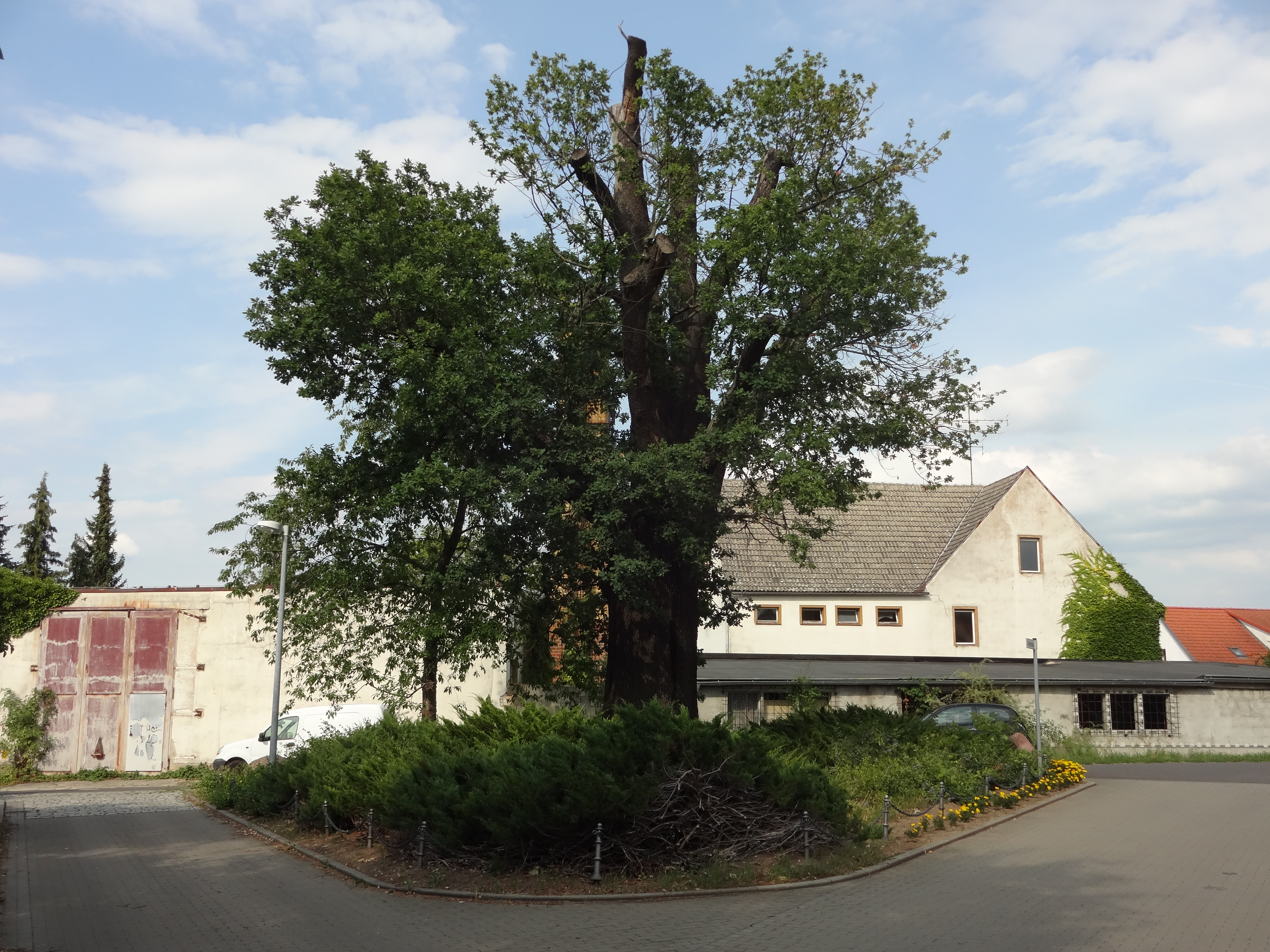 Naturdenkmal Stieleiche Ecke Feldstraße/Hauptstraße in Zerkwitz